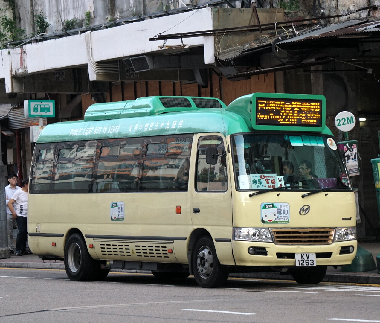 中文（香港）: 九龍區專線小巴22M線，正在裕民坊等待開出